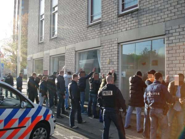 Een actie van Skwibus samen met de Regionale Interventie Eenheid en de wijkpolitie van de regiopolitie Rotterdam-Rijnmond